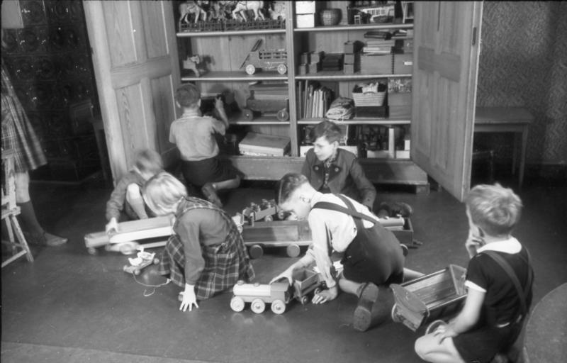 Vorbildlicher Betriebskindergarten. Die Schultheiß-Brauerei (VEB) hat einen der schönsten Betriebskindergärten Berlins eingerichtet. UBz: Jeder hat etwas gefunden. Der Schrank scheint unerschöpflich zu sein. Aufn.: Illus/Igel 4017-49 29.9.1949